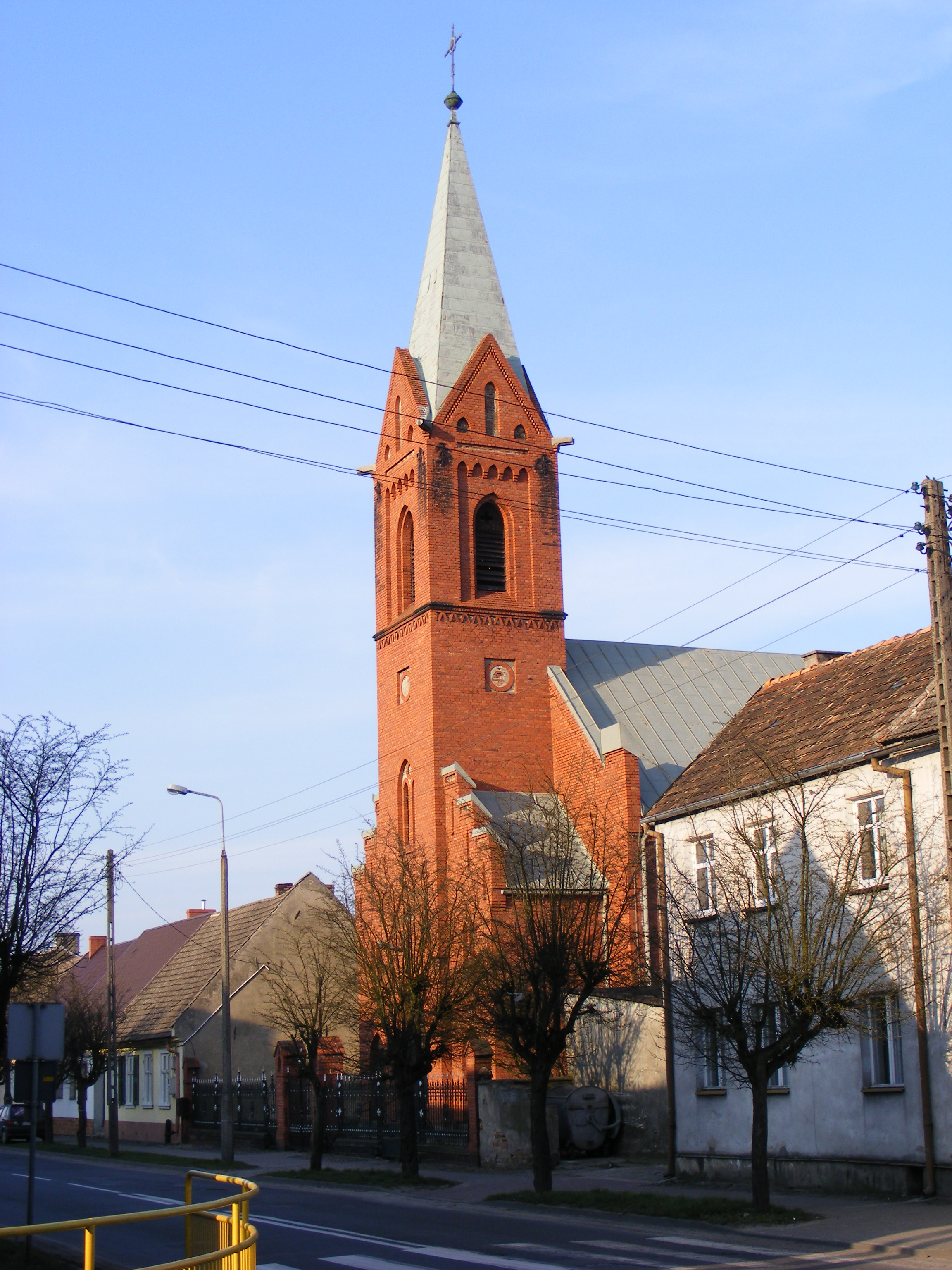 Drezdenko, ul. Żeromskiego - kościół poparafialny p.w. Matki Boskiej Różańcowej z 1898 r. (zabytek nr rejestr. L-308/A)